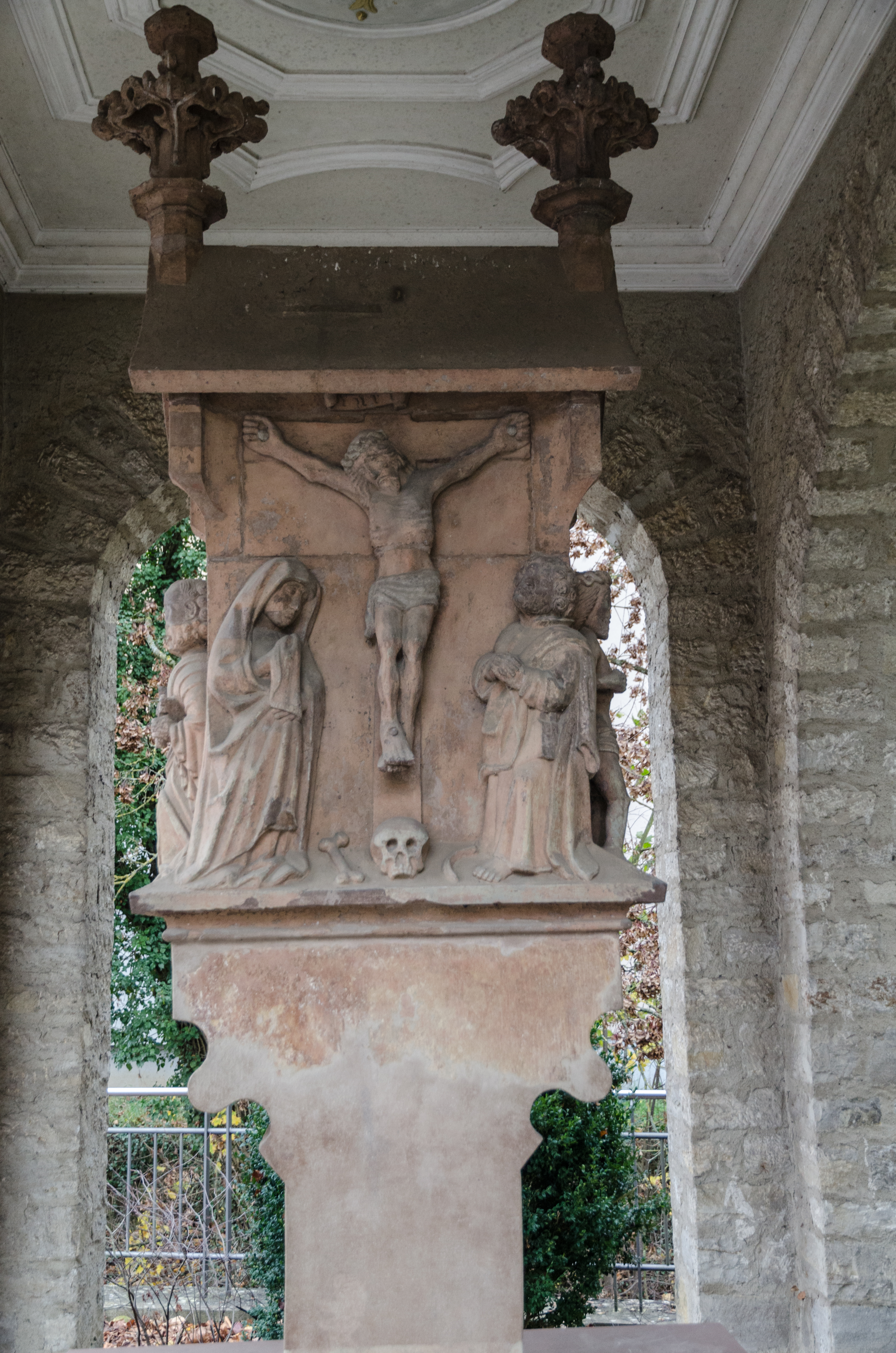 Volkach, Am Bach, Bildstock